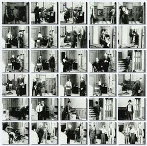 fotografía de la película The New Janitor de 1914